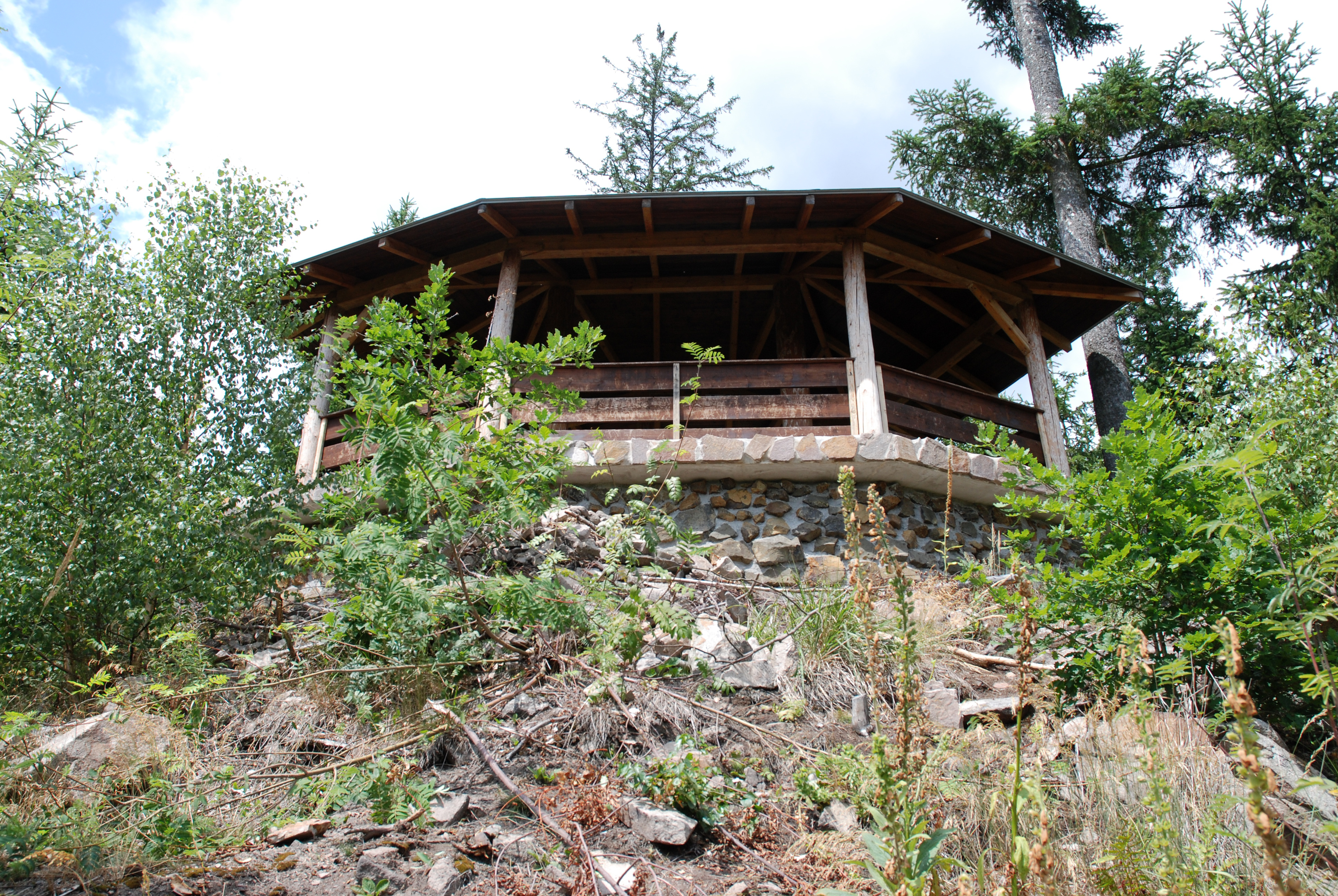 Jungmannův altán u Jungmannovy cesty v karlovarských lázeňských lesích